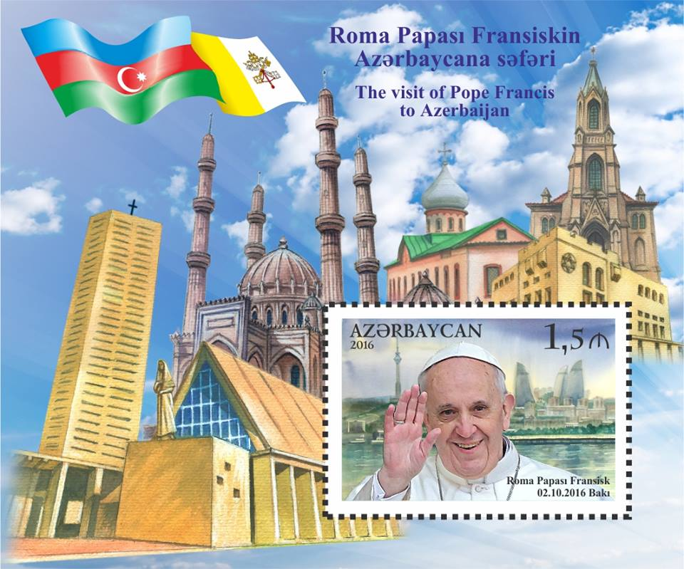 The visit of Pope Francis to Azerbaijan. N 1283 – 1,5 manat. The stamp is dedicated to the pastoral visit of Pope Francis to Azerbaijan on 2nd of October 2016.